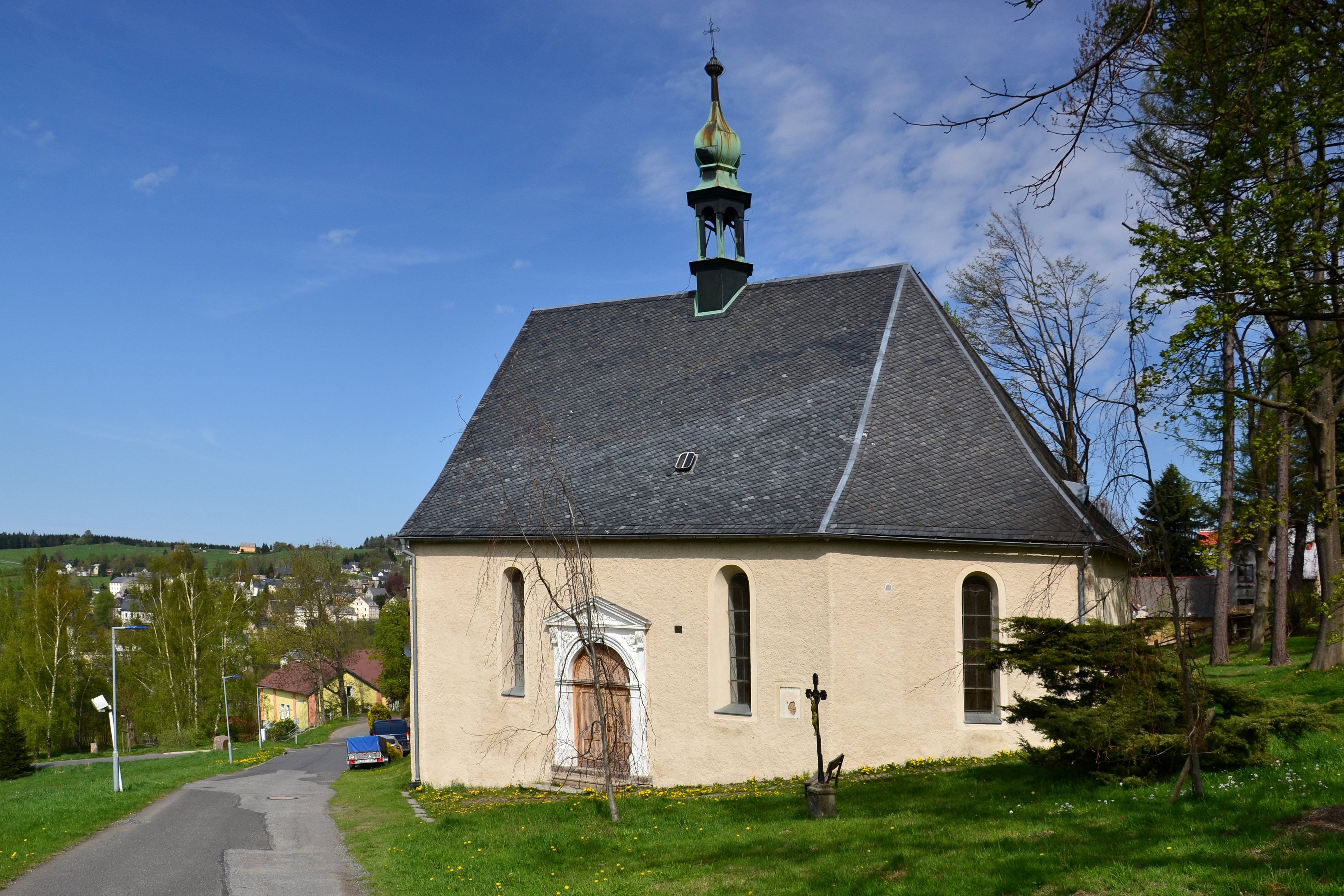 Hřbitovní kostel svatého Martina, ulice Bedřicha Smetany, Vejprty.